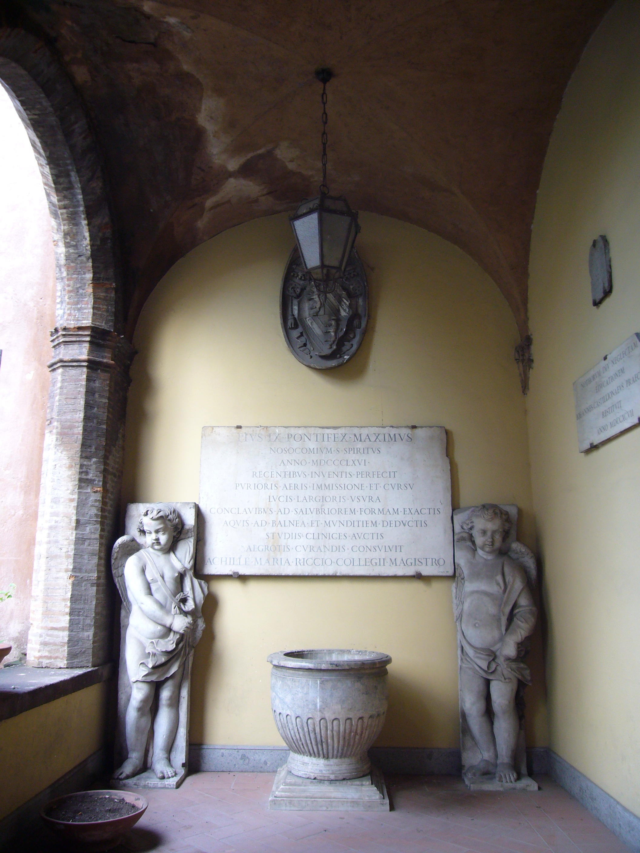 Roma, Arcispedale S. Spirito in Sassia, Museo storico nazionale dell'arte sanitaria: memoria di Pio IX (1866)